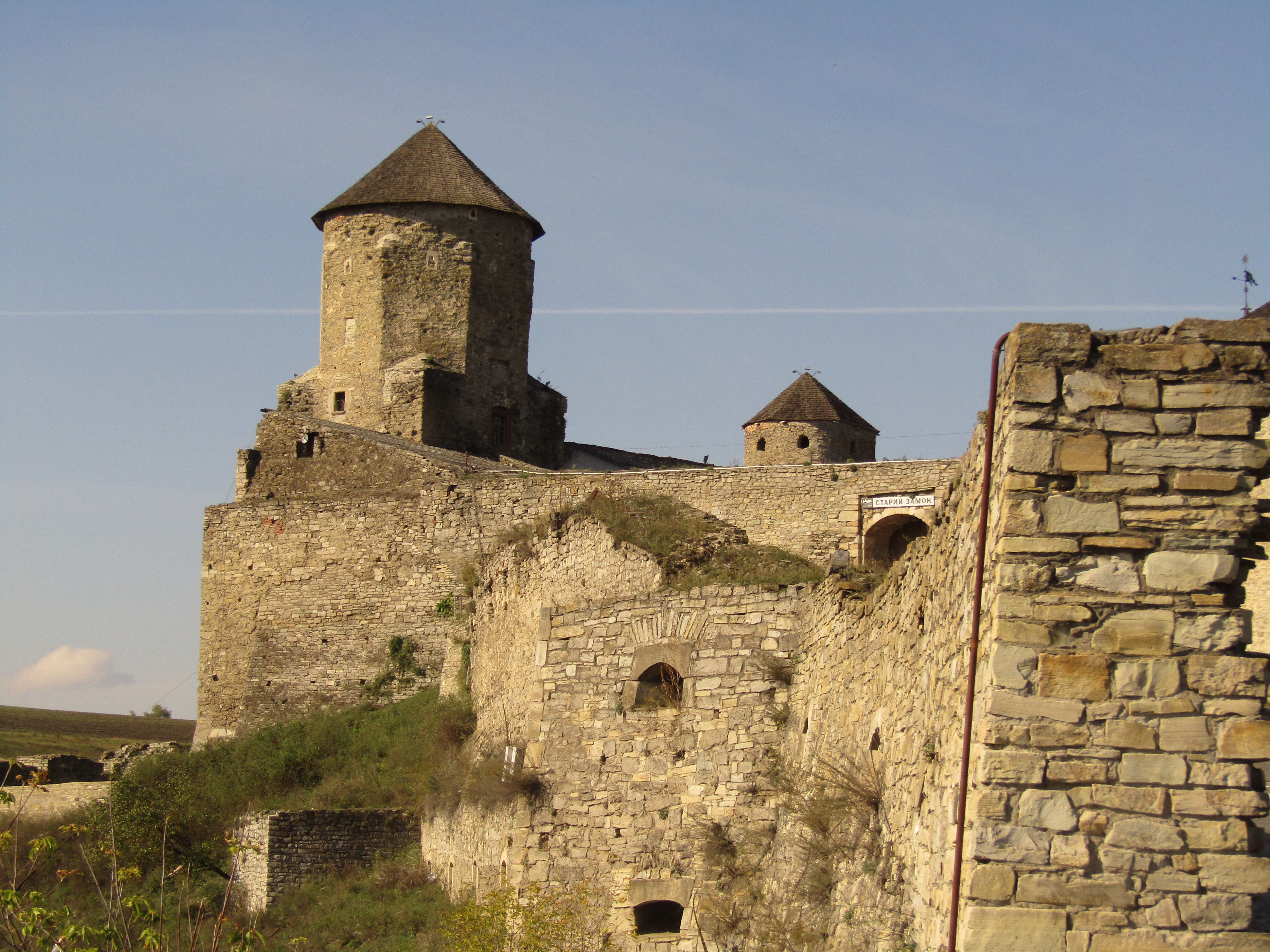 Башта Папська № 12, в якій тричі був ув'язнений У. Кармелюк, Кам'янець-Подільський, вул. Замкова